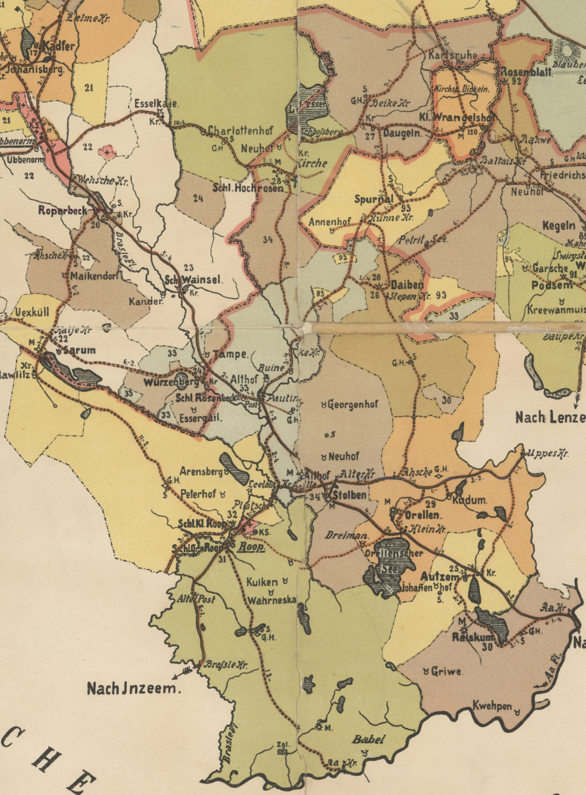 Straupe kihelkonna mõisad 1903. aasta kaardil.